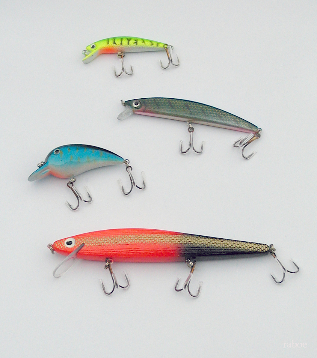 verschiedene einfache Wobbler (Angelzubehör)